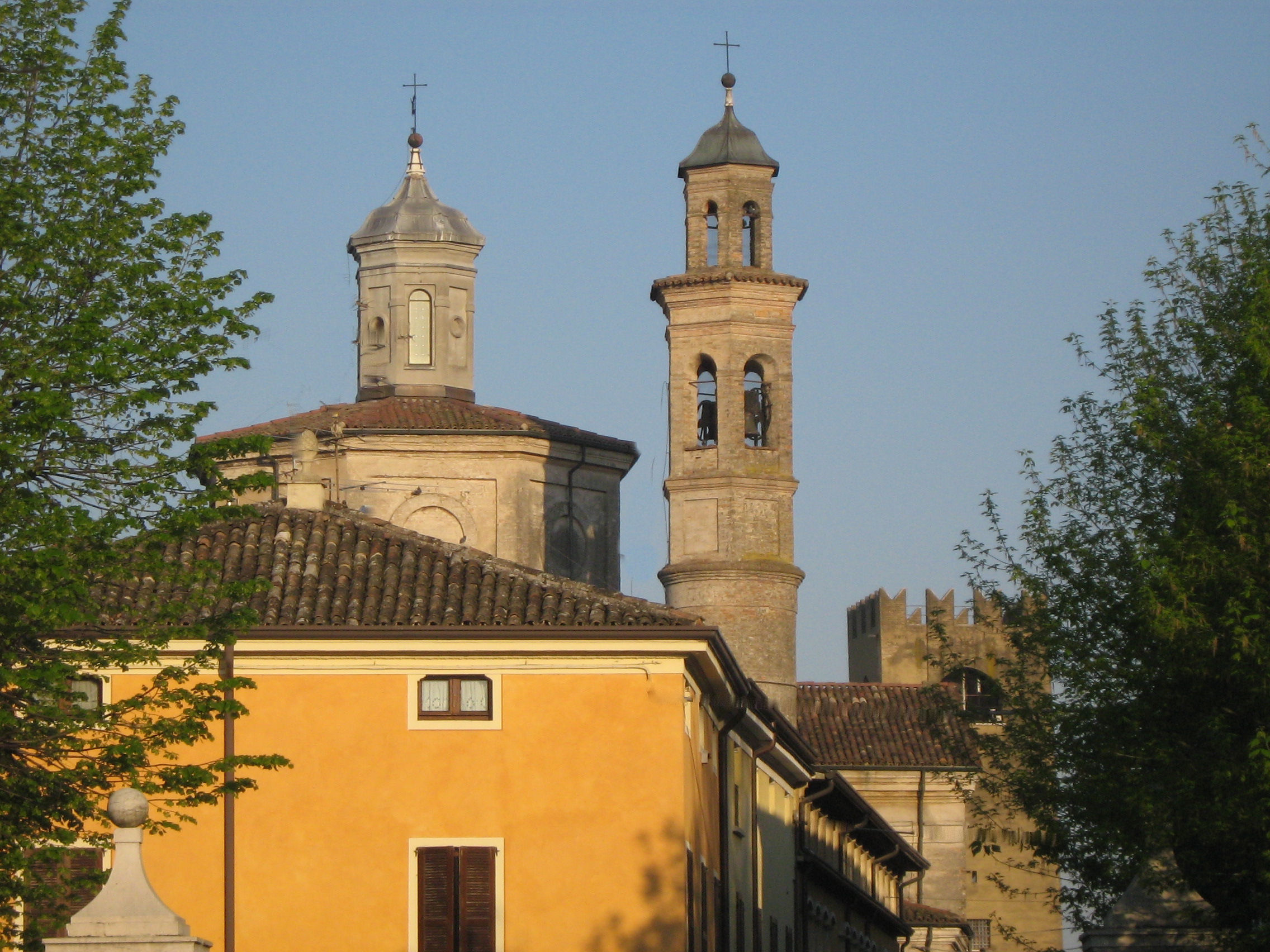 Castel Goffredo panorama